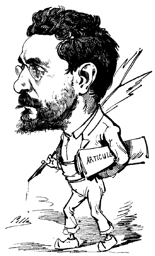 Madrid Cómico núm. 41. 2-12-1883. Luis Taboada